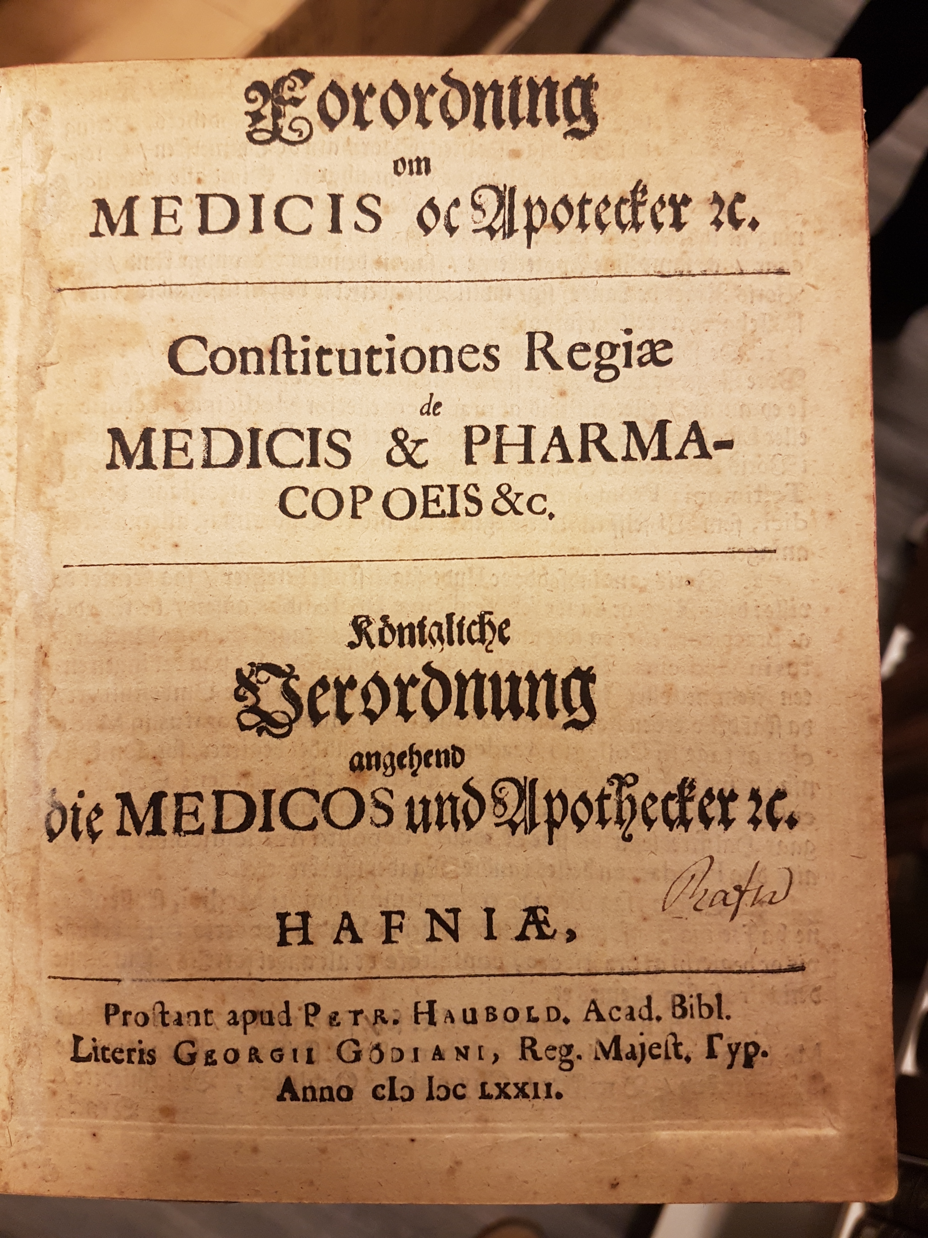 Forordning om Medicis og Apothekere av 4. desember, 1672 (Forside)